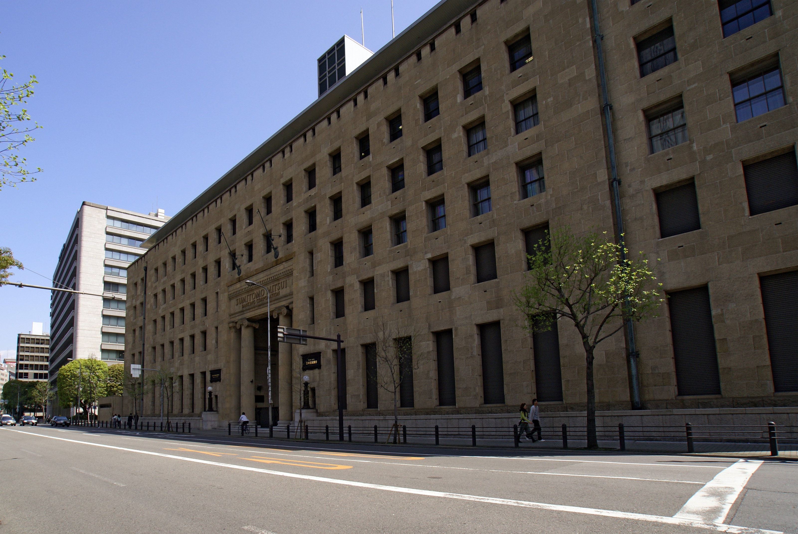 Sumitomo building in Osaka, Osaka prefecture, Japan